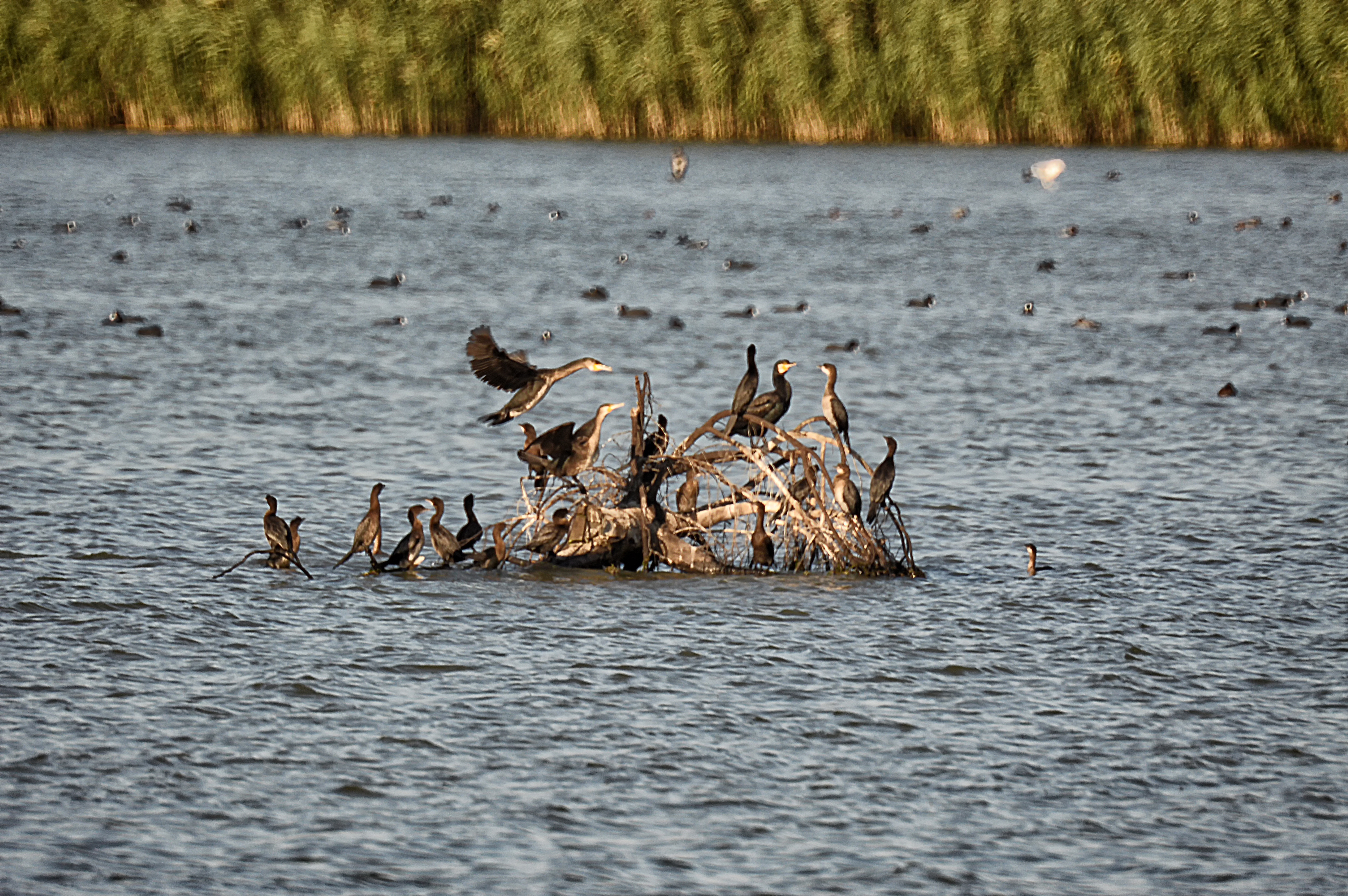 Srpski (latinica): Ово је фотографија заштићеног природног добра у Србији под шифром: РП13This is a a photo of a natural area in Serbia with ID: РП13 Слано Копово